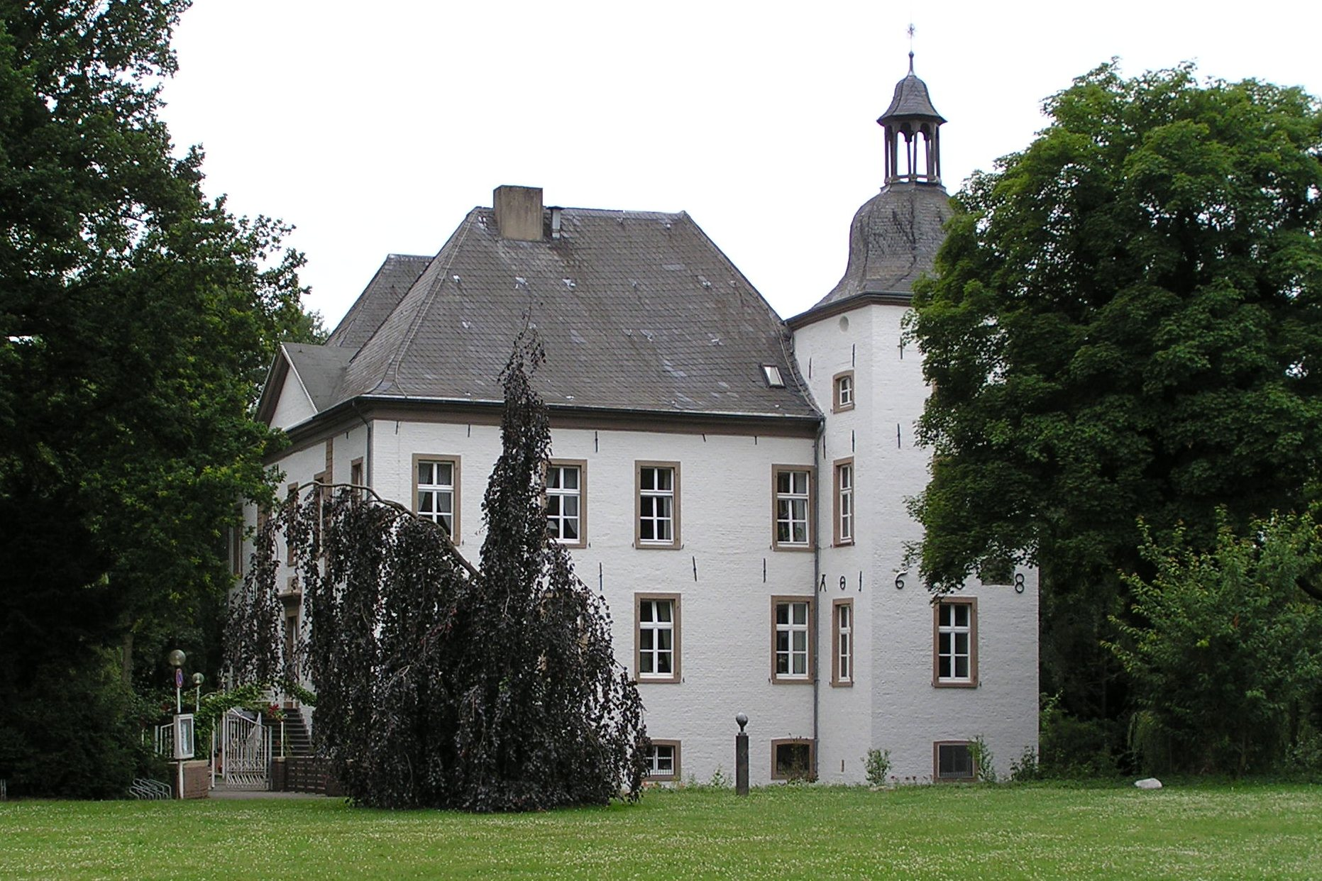 "Haus Voerde" in Voerde, Germany